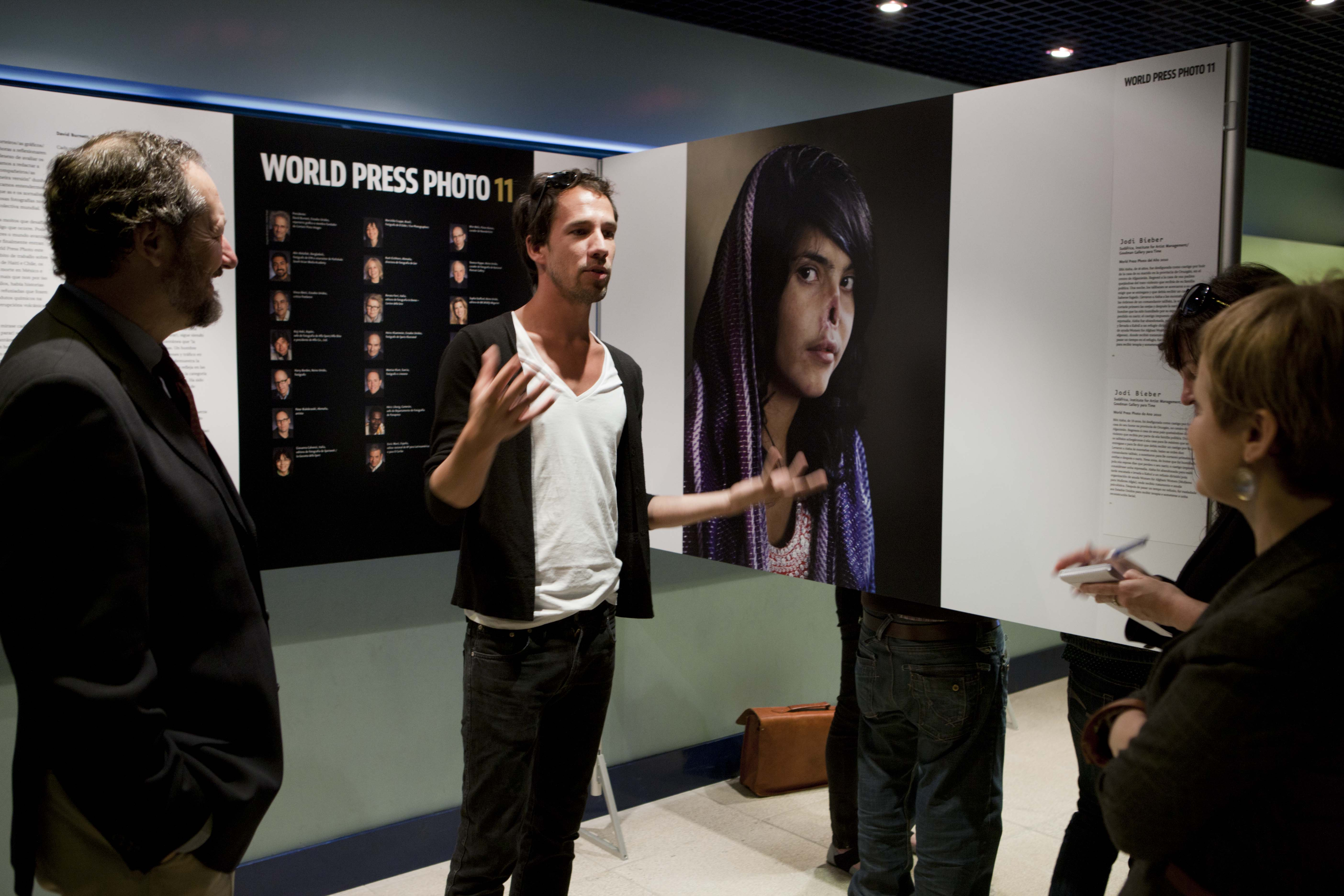 Exposición "World Press Photo 2011" no Aquarium Finisterrae da Coruña